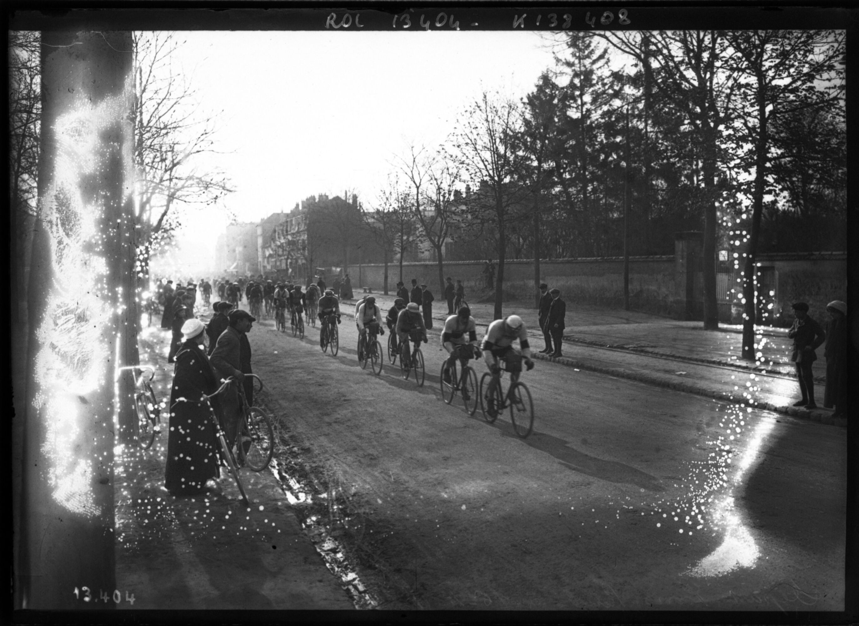 Départ du Paris-Roubaix 1911 à Chatou